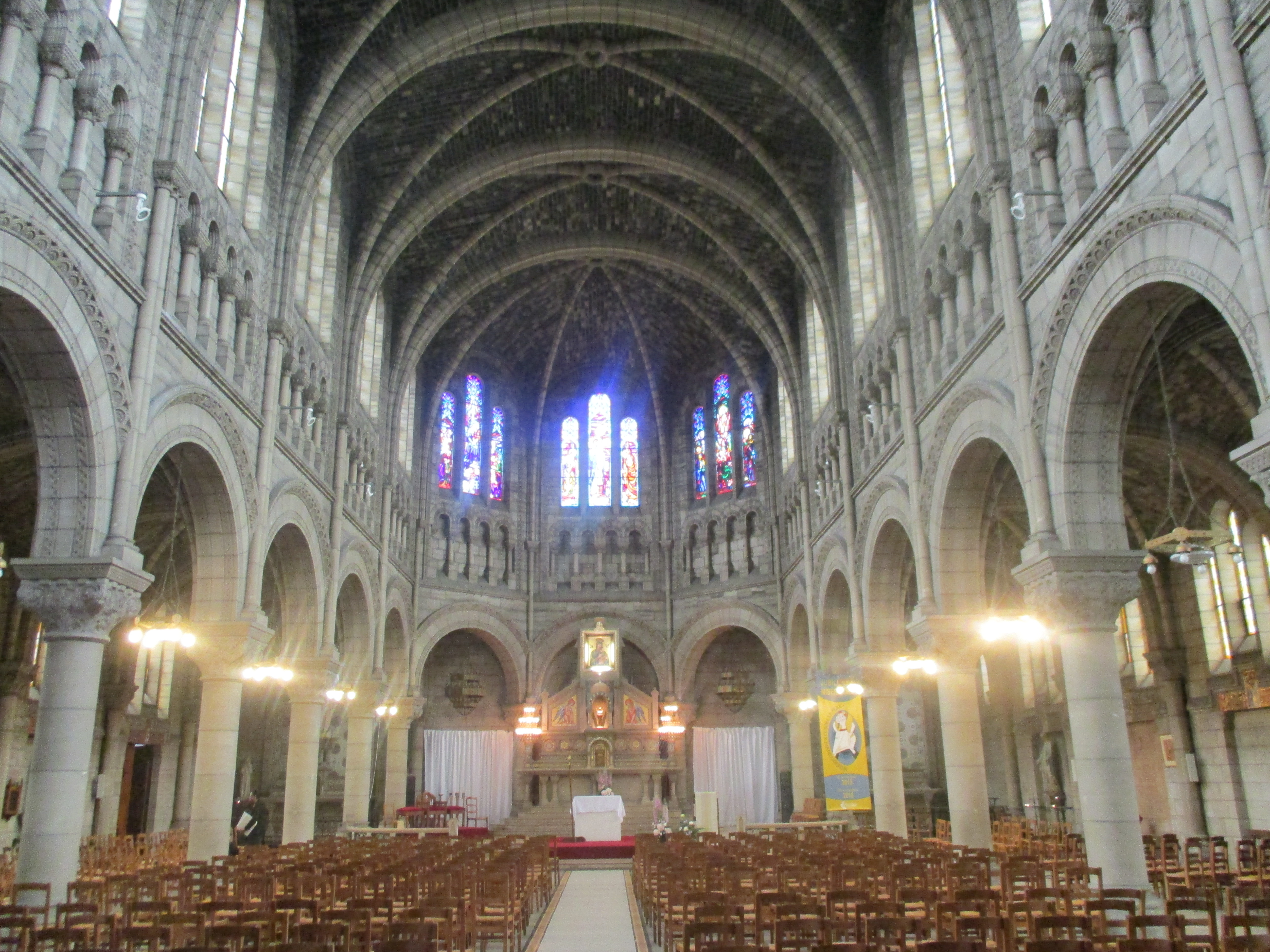 Intérieur de l'église Notre-Dame-du Perpétuel-Secours d'Asnières-sur-Seine.